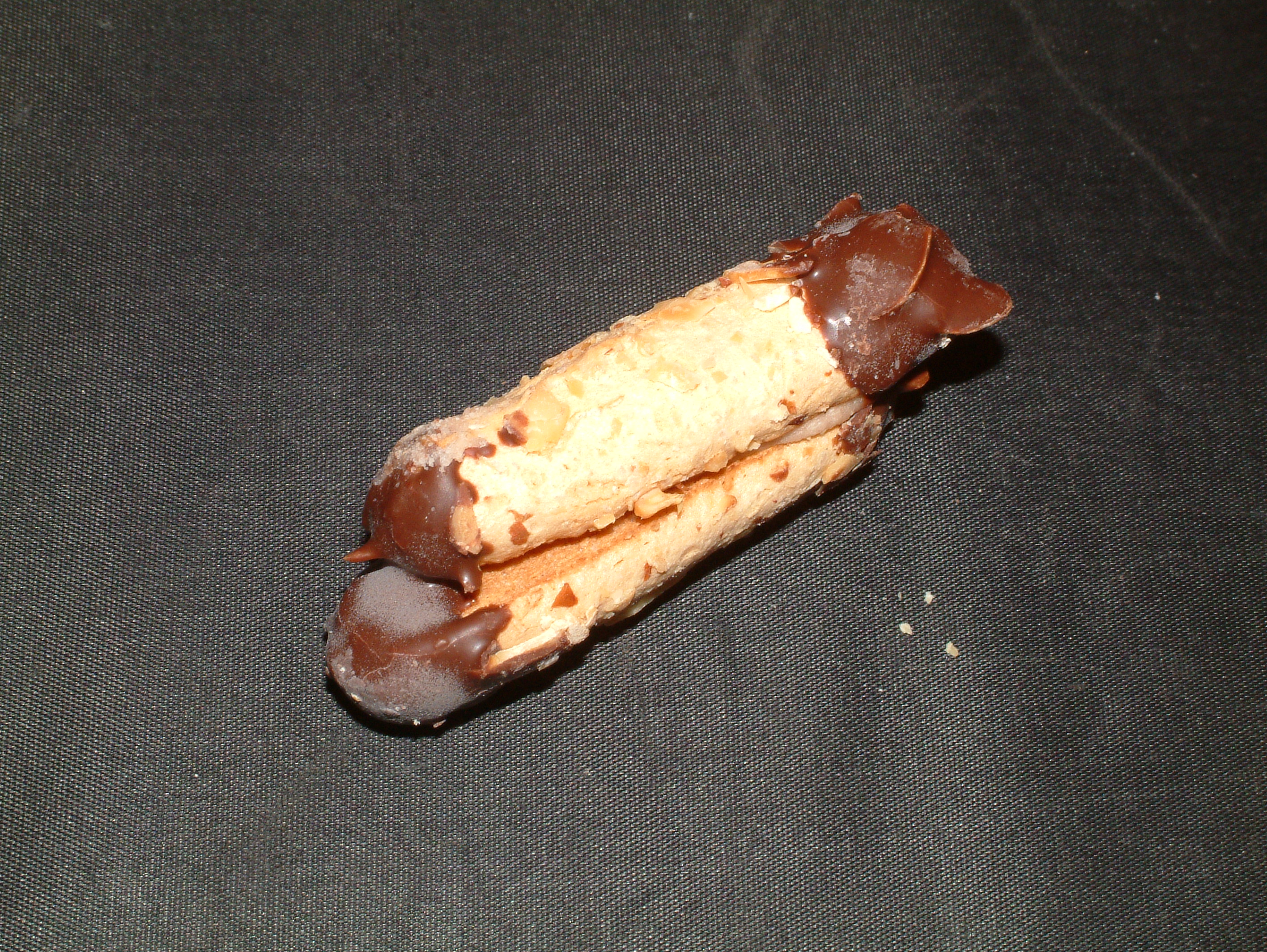 Een bokkepootje (koekje)